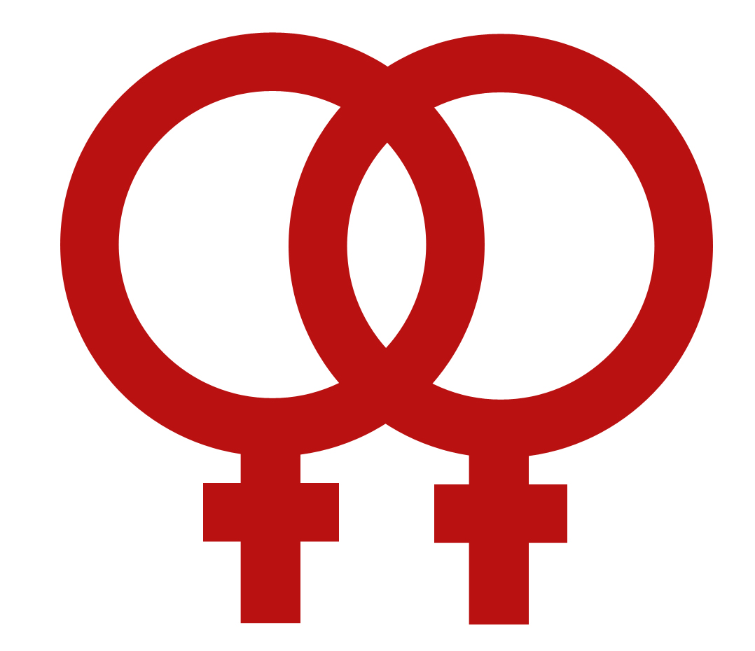 double venus symbol